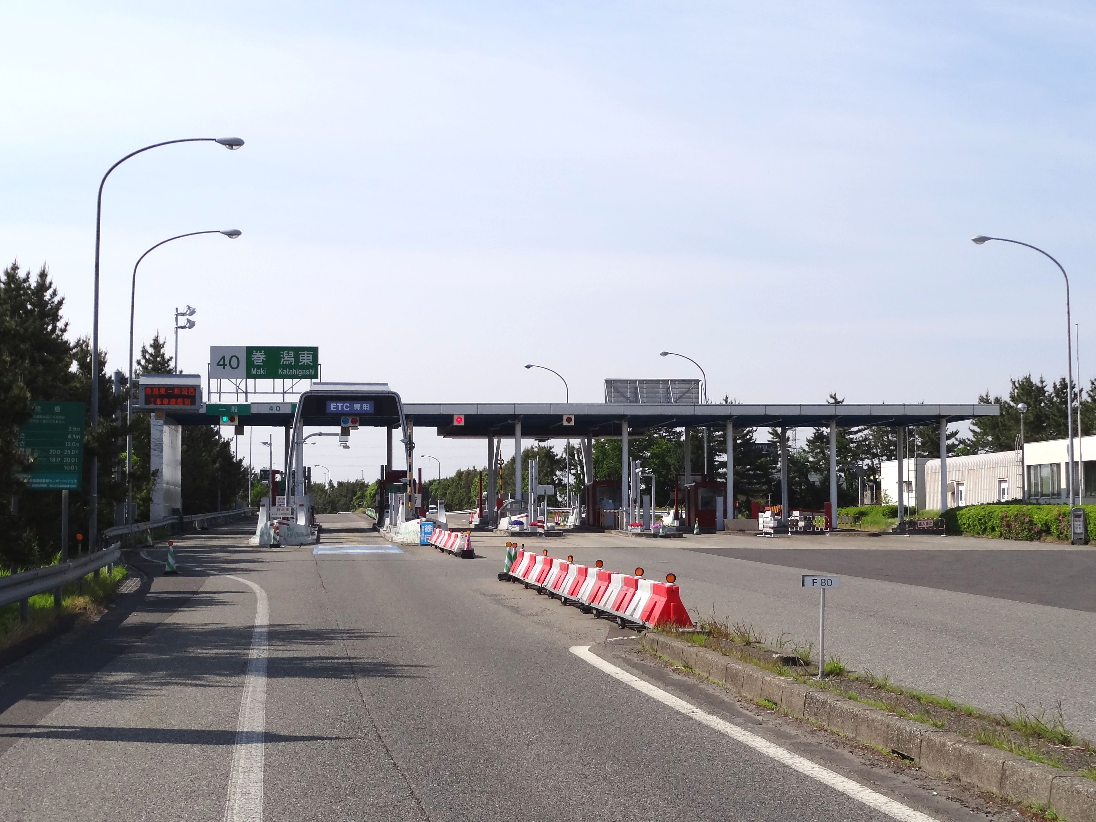 北陸自動車道 巻潟東インターチェンジ（料金所付近）